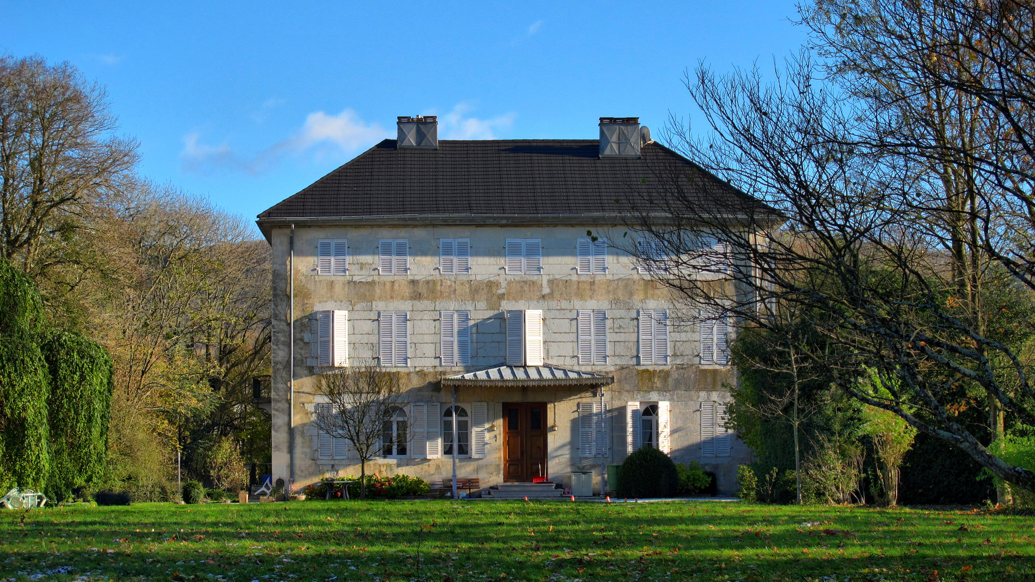 Inscrit aux monuments historiques sous le numéro PA25000043